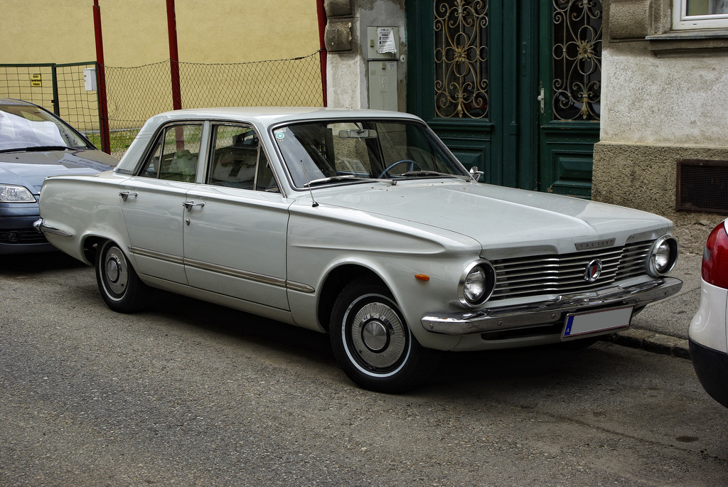 1964 Plymouth Valiant